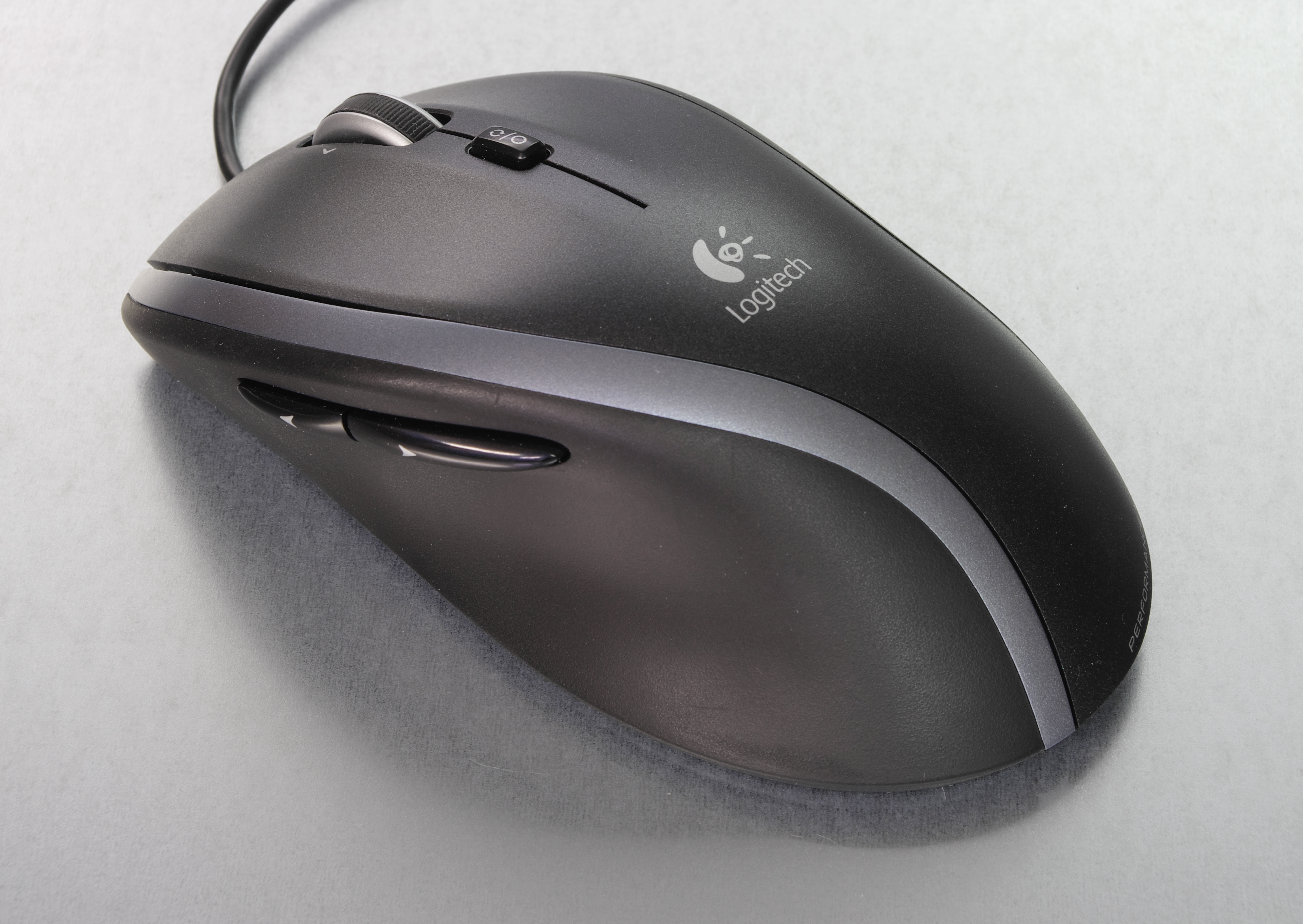 M500 Laser Maus